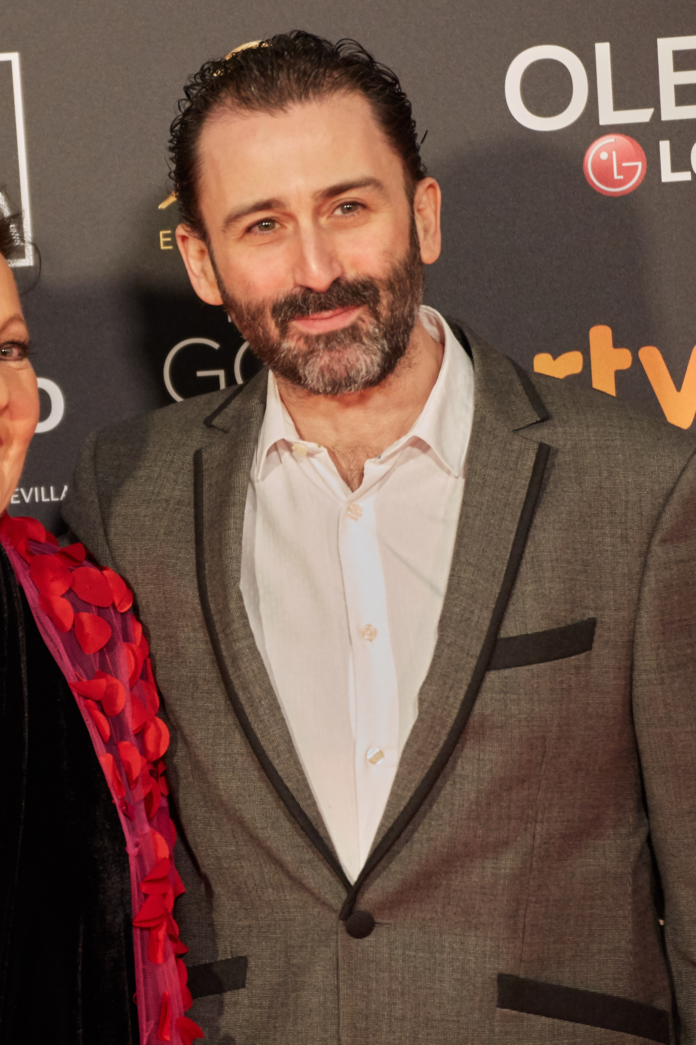 Javier Limón en la alfombra roja de los Premios Goya celebrados en Sevilla en Febrero 2019. Nominado a Mejor Canción por la canción "Una de esas noches sin final" de la película "Todos lo saben"